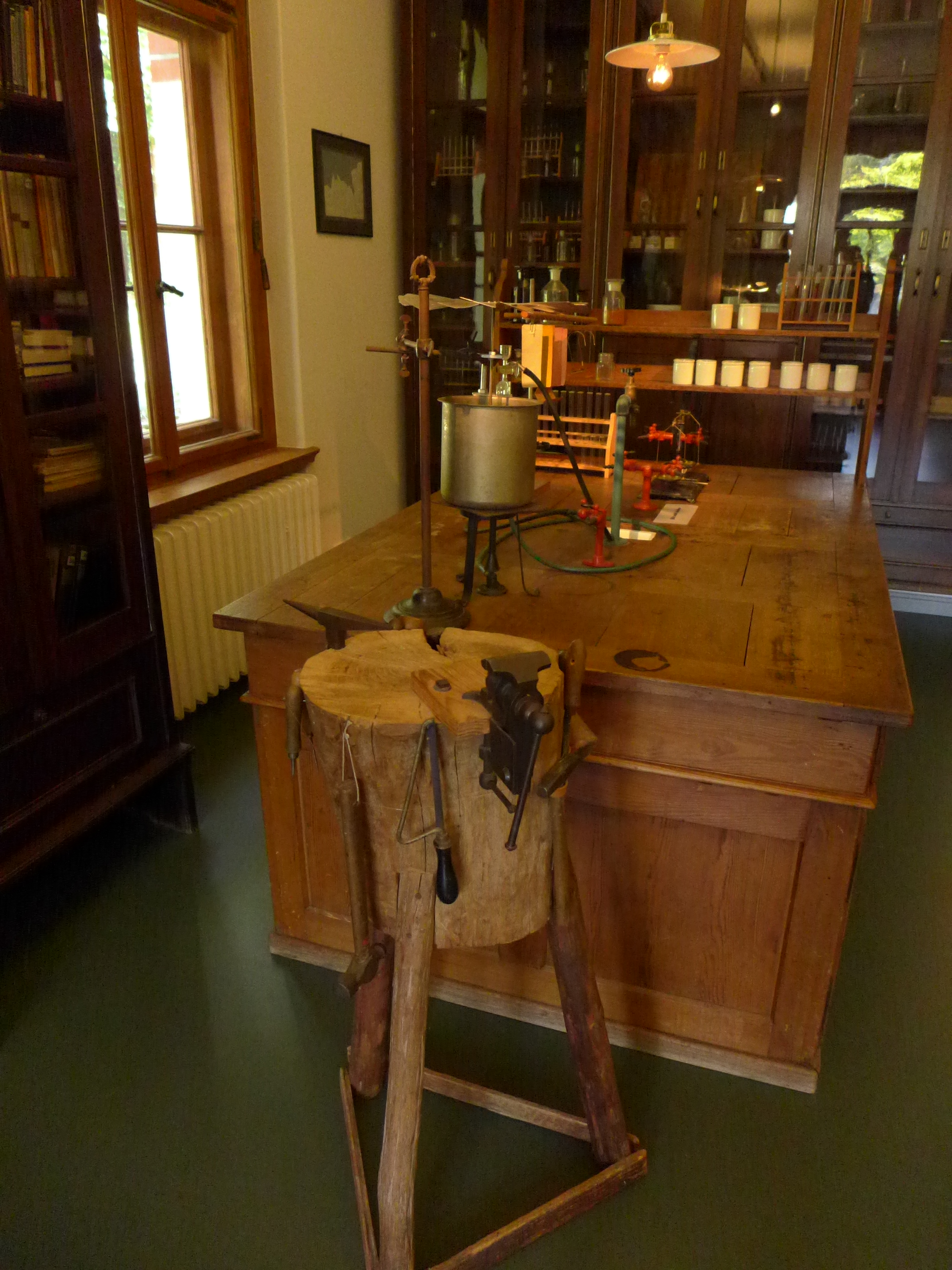 Laboratoria tablo de Wilhelm Ostwald en domo "Energie", Großbothen, Germanio.